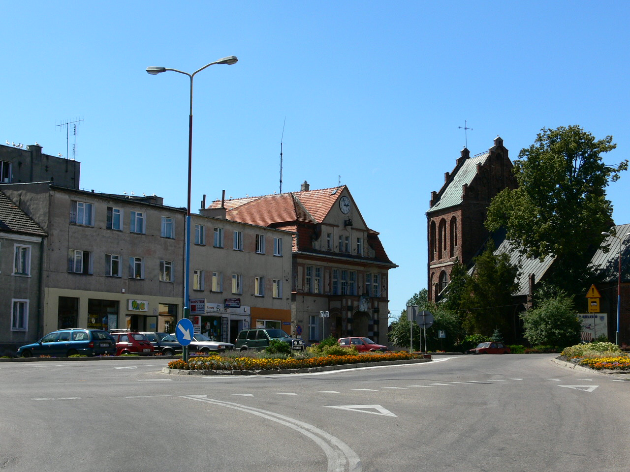 Karlino - Rynek w tle ratusz i kościół pw. św. Michała Archanioła